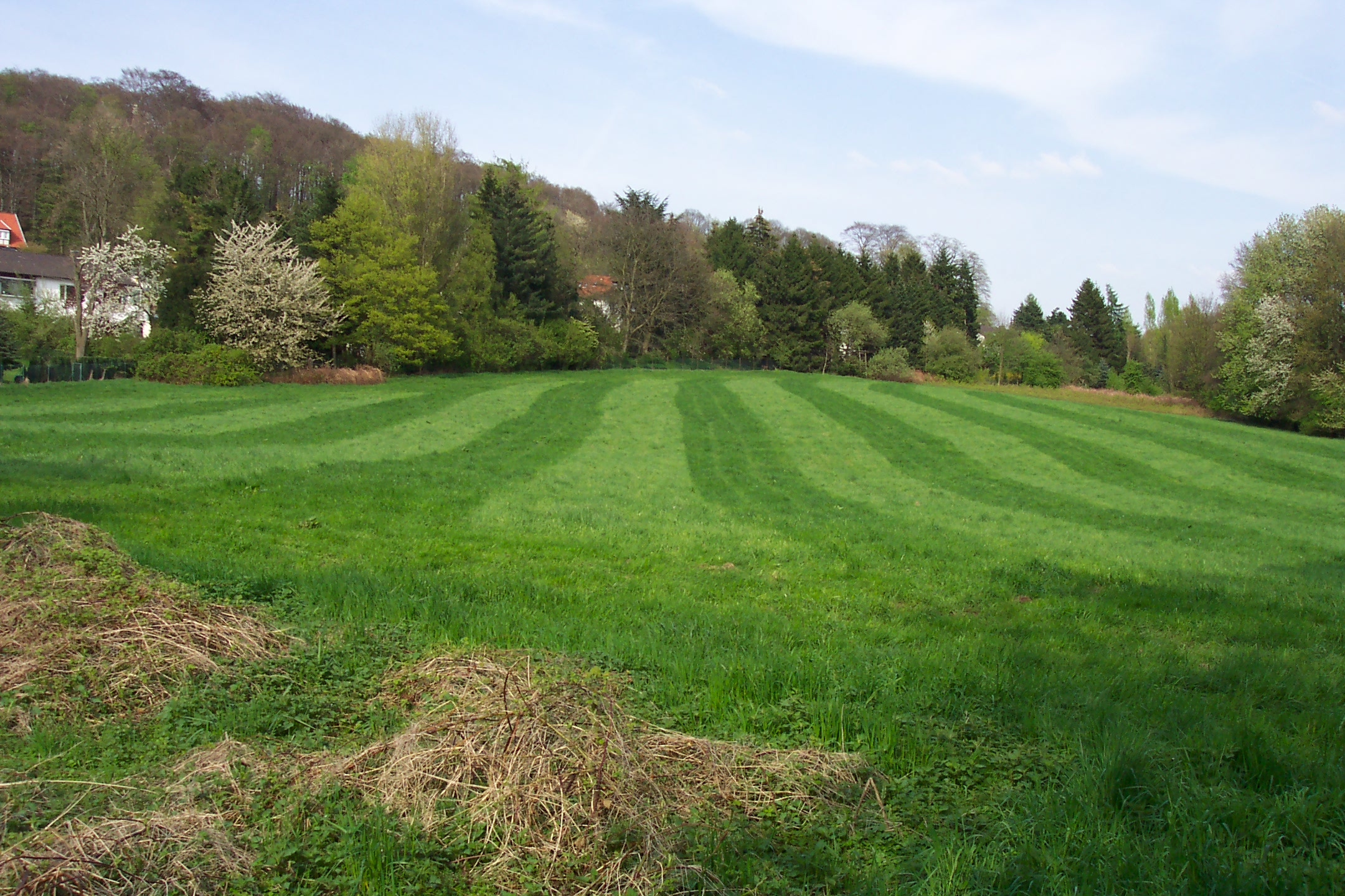 Der Eulenkopfweg, Wuppertal